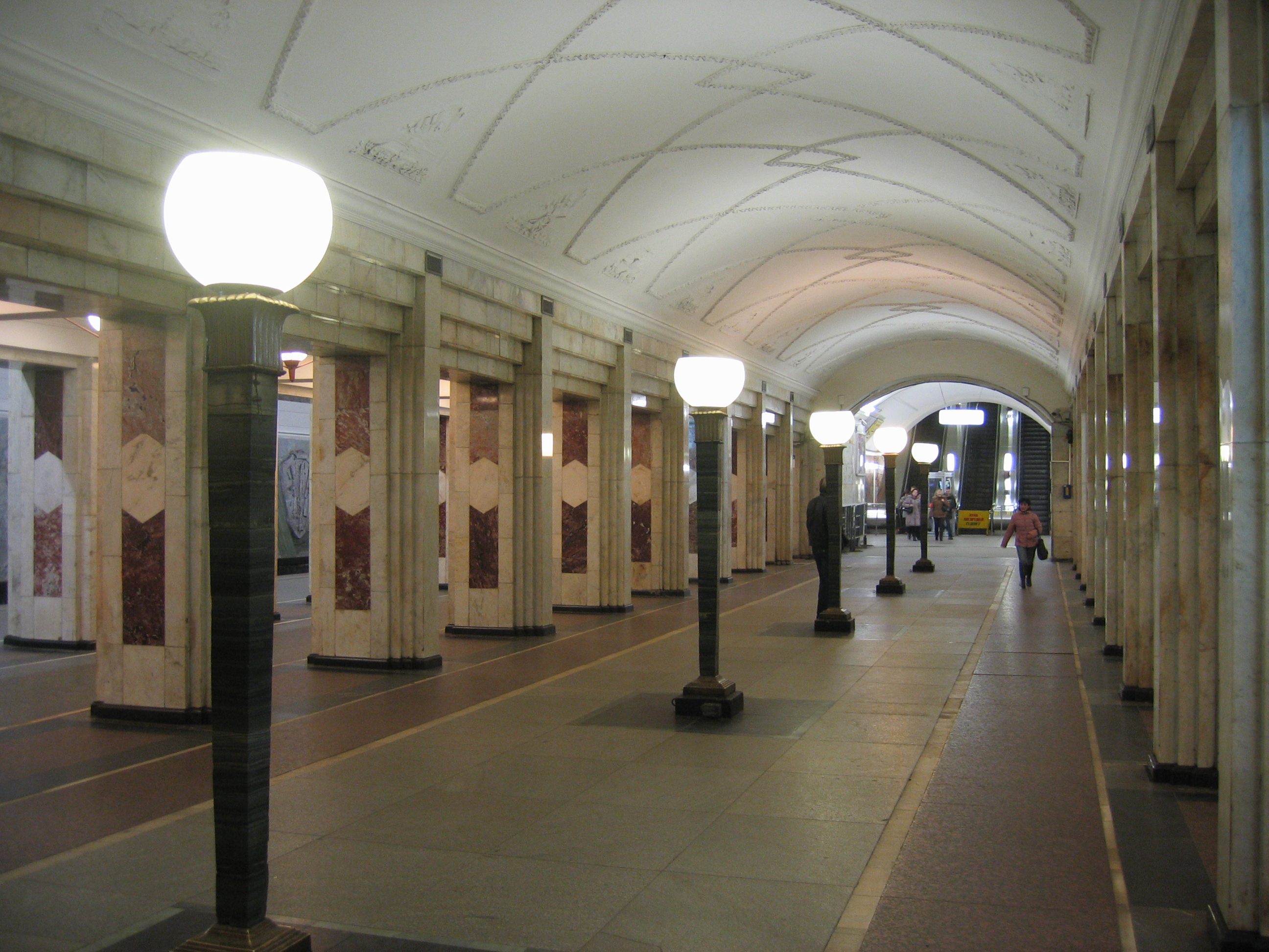 Московский метрополитен, станция Семёновская